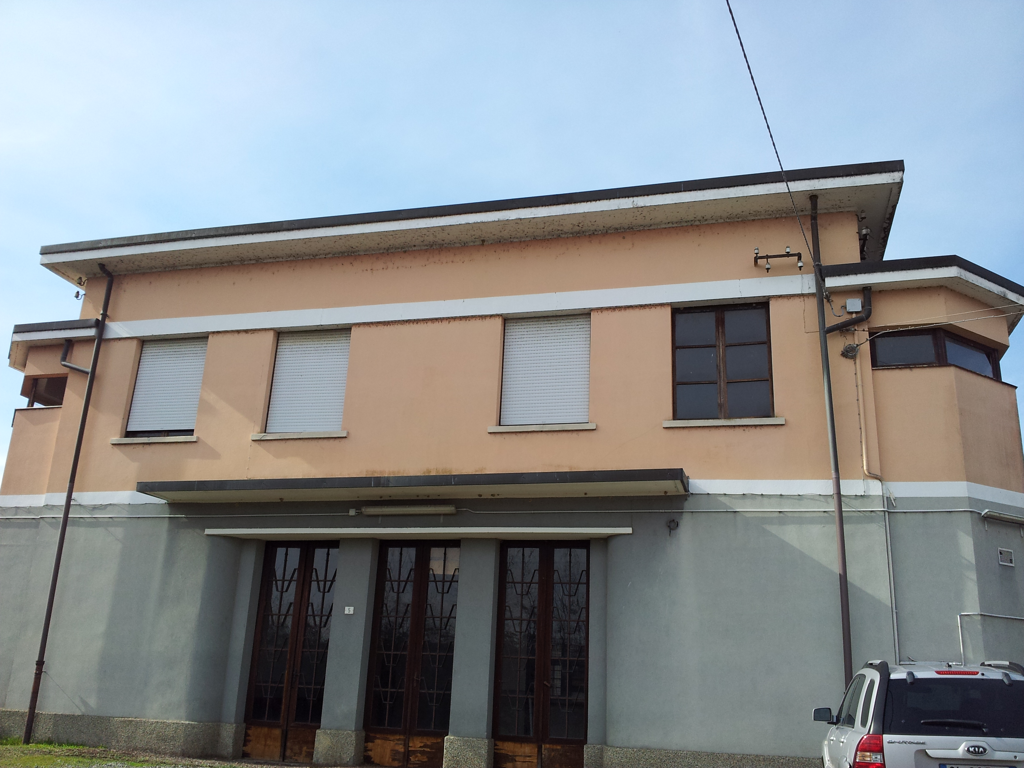 Stazione ferroviaria di Rovasenda, vista del fabbricato viaggiatori lato strada.